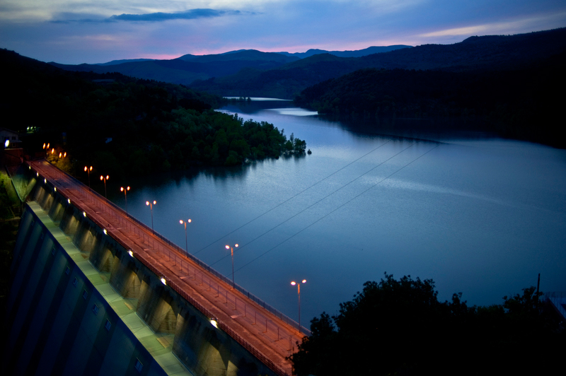 Ancipa, diga, idroelettrico